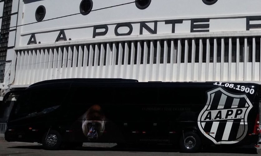 Fotografia tirada do onibus oficial da Ponte Preta, em frente ao estádio Moisés Lucarelli.